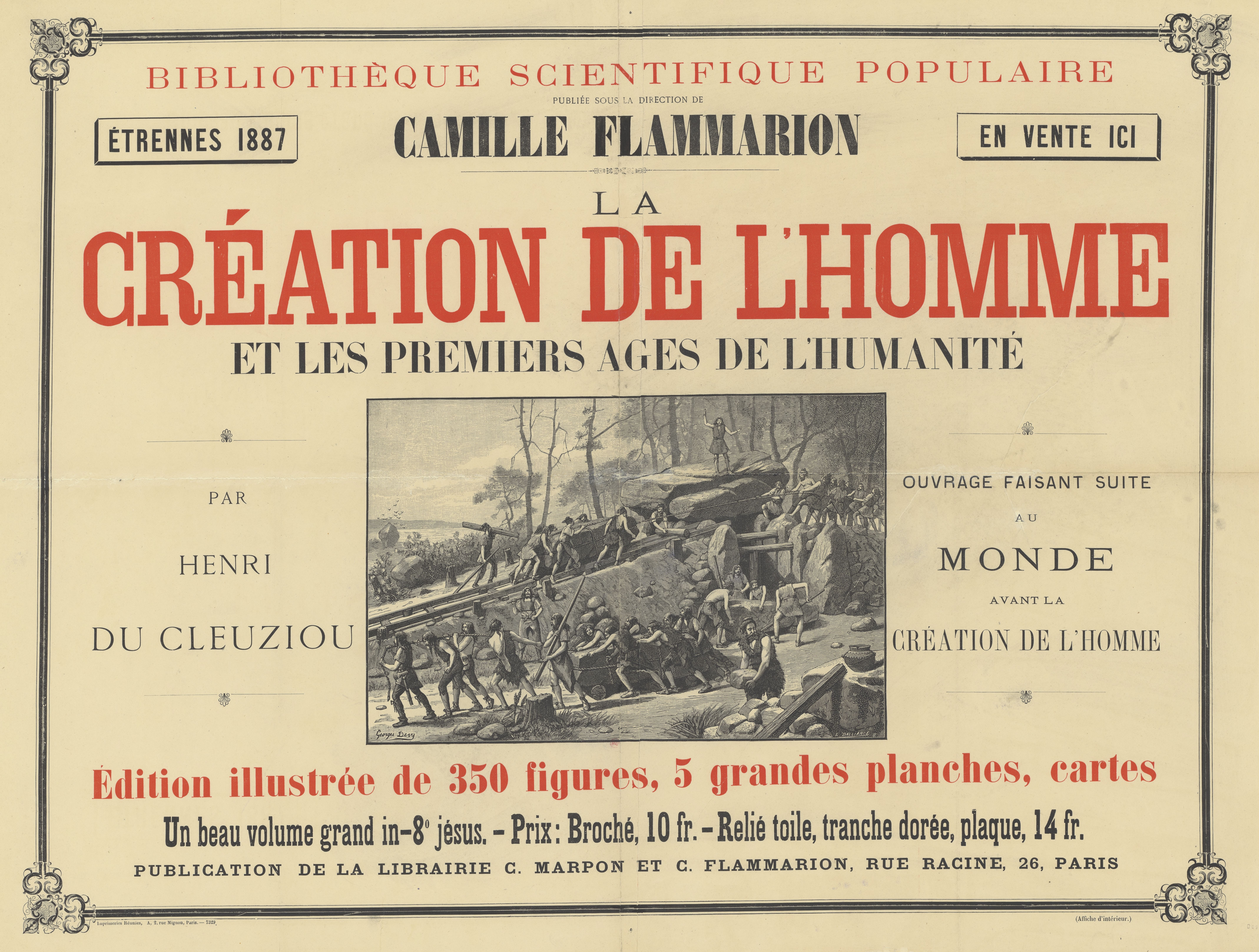 Bibliothèque scientifique populaire publié sous la direction de Camille Flammarion..., la Création de l'homme par Henri Cleuziou ... : [affiche]